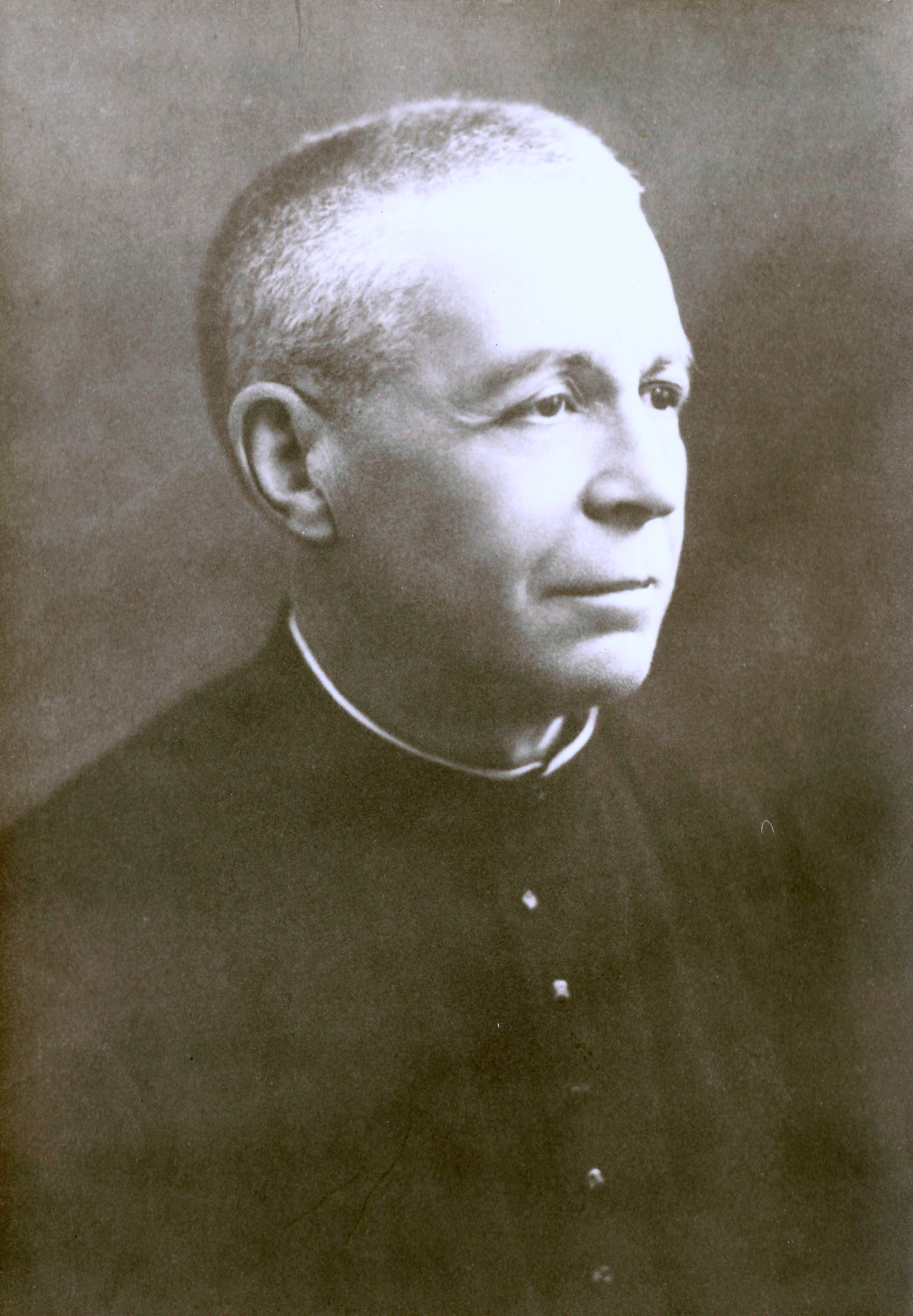 Portrait du chanoine Edmond Chabot (Marseille)